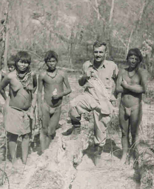 Antropólogo Austriaco-venezolano Hellmuth Straka, con nativos Japrerias en 1960.